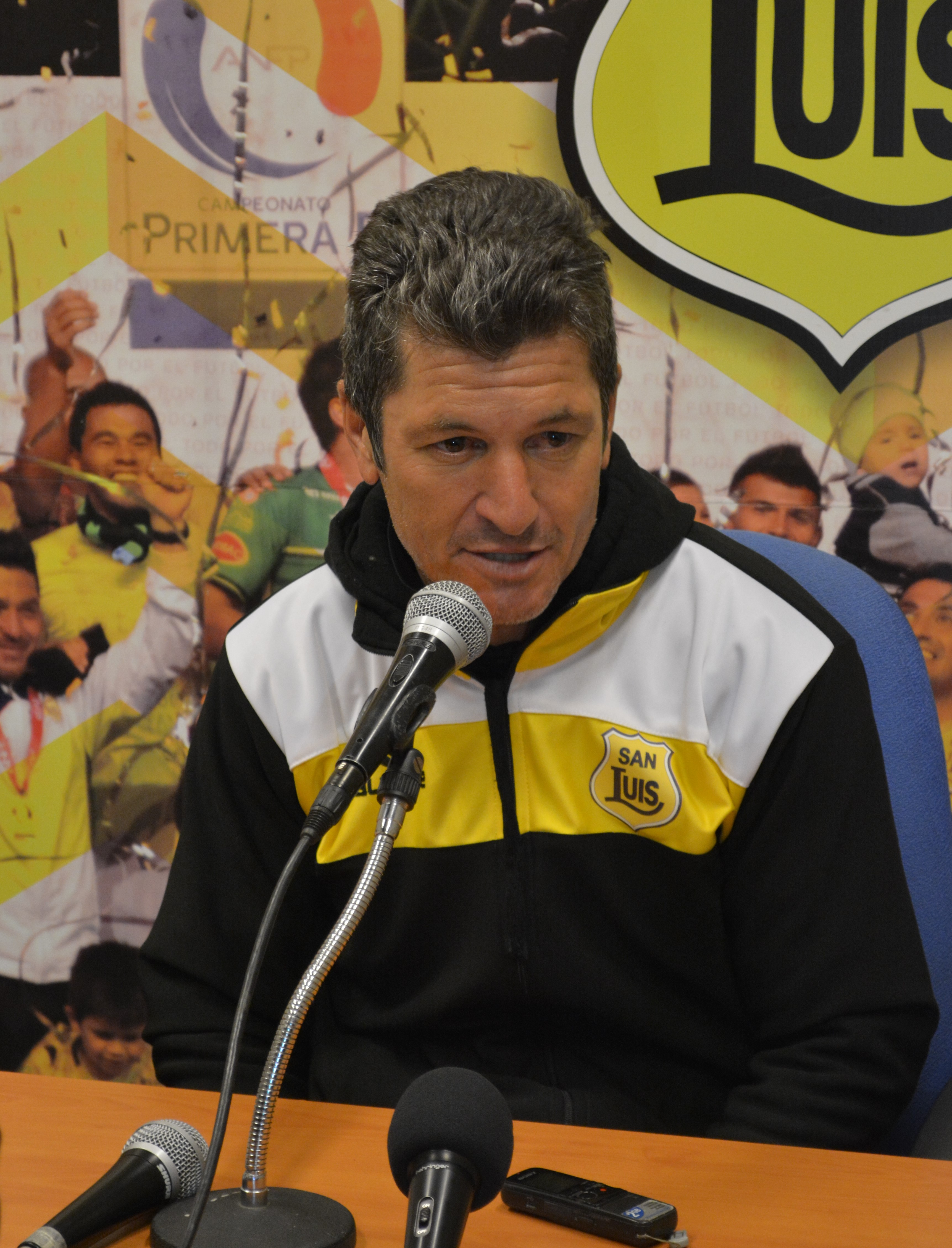 Mario Sciaqcua, entrenador de San Luis